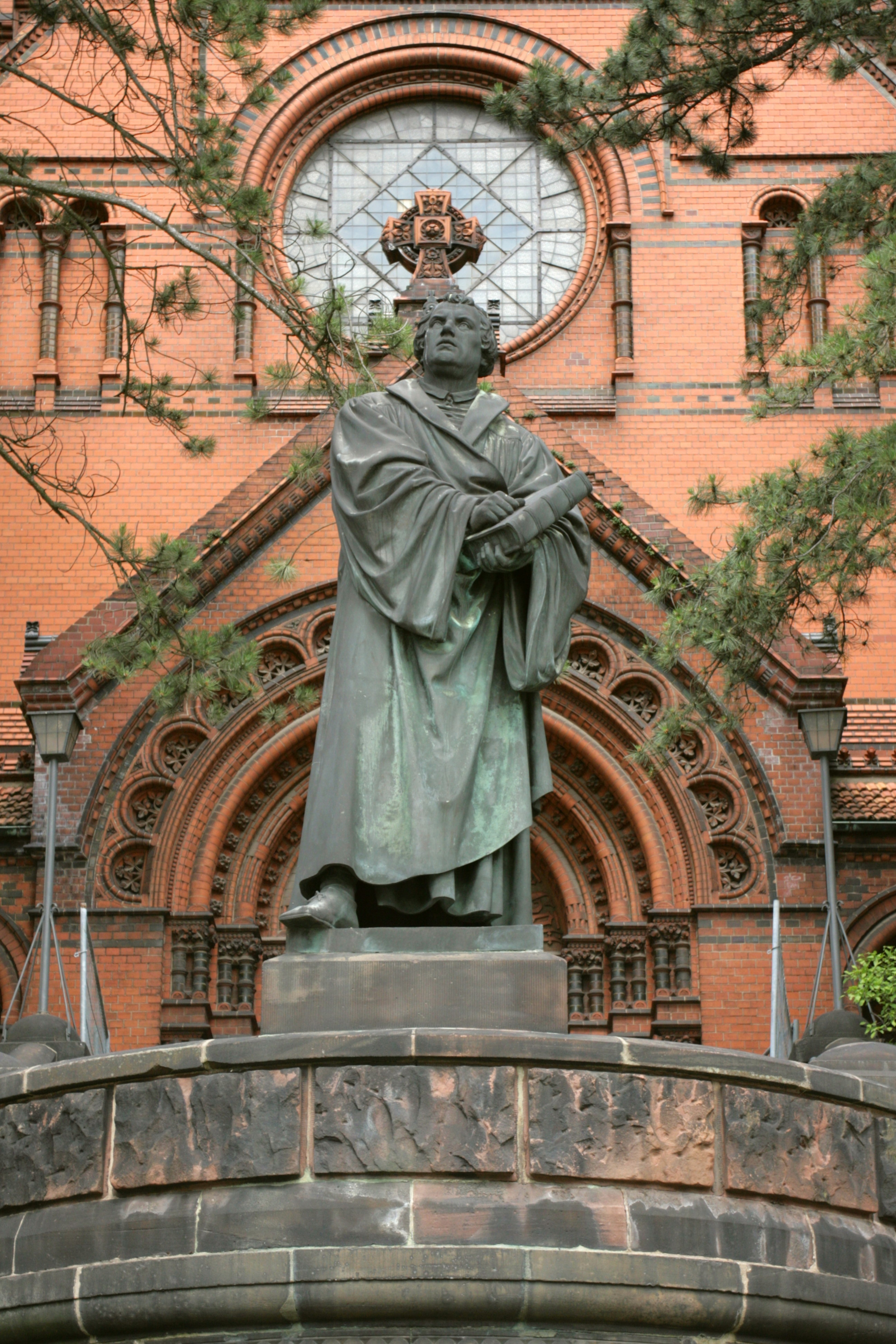 Lutherdenkmal am Lutherplatz in Görlitz